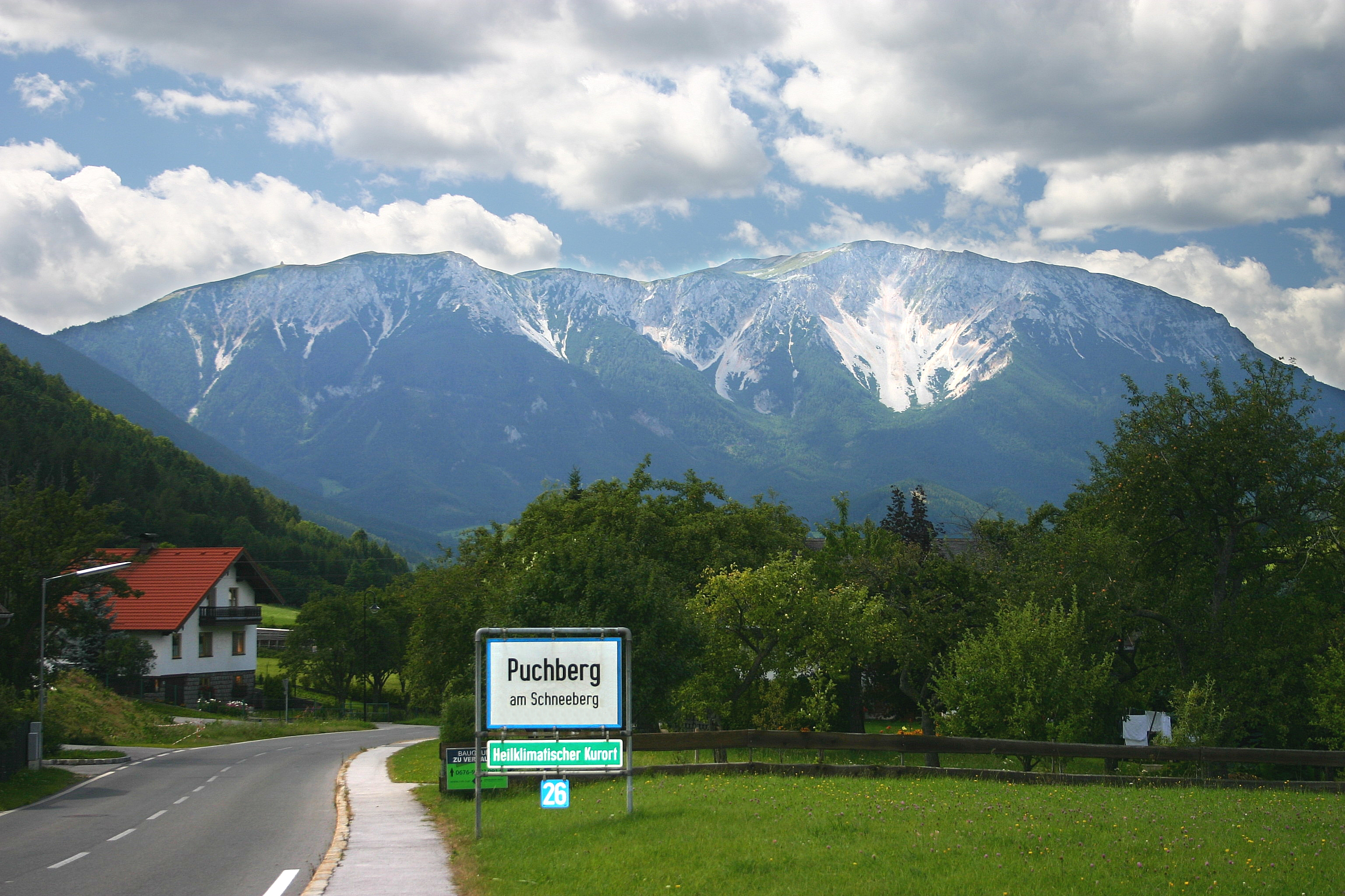 Puchberg am Schneeberg Ortseinfahrt mit dem Schneeberg